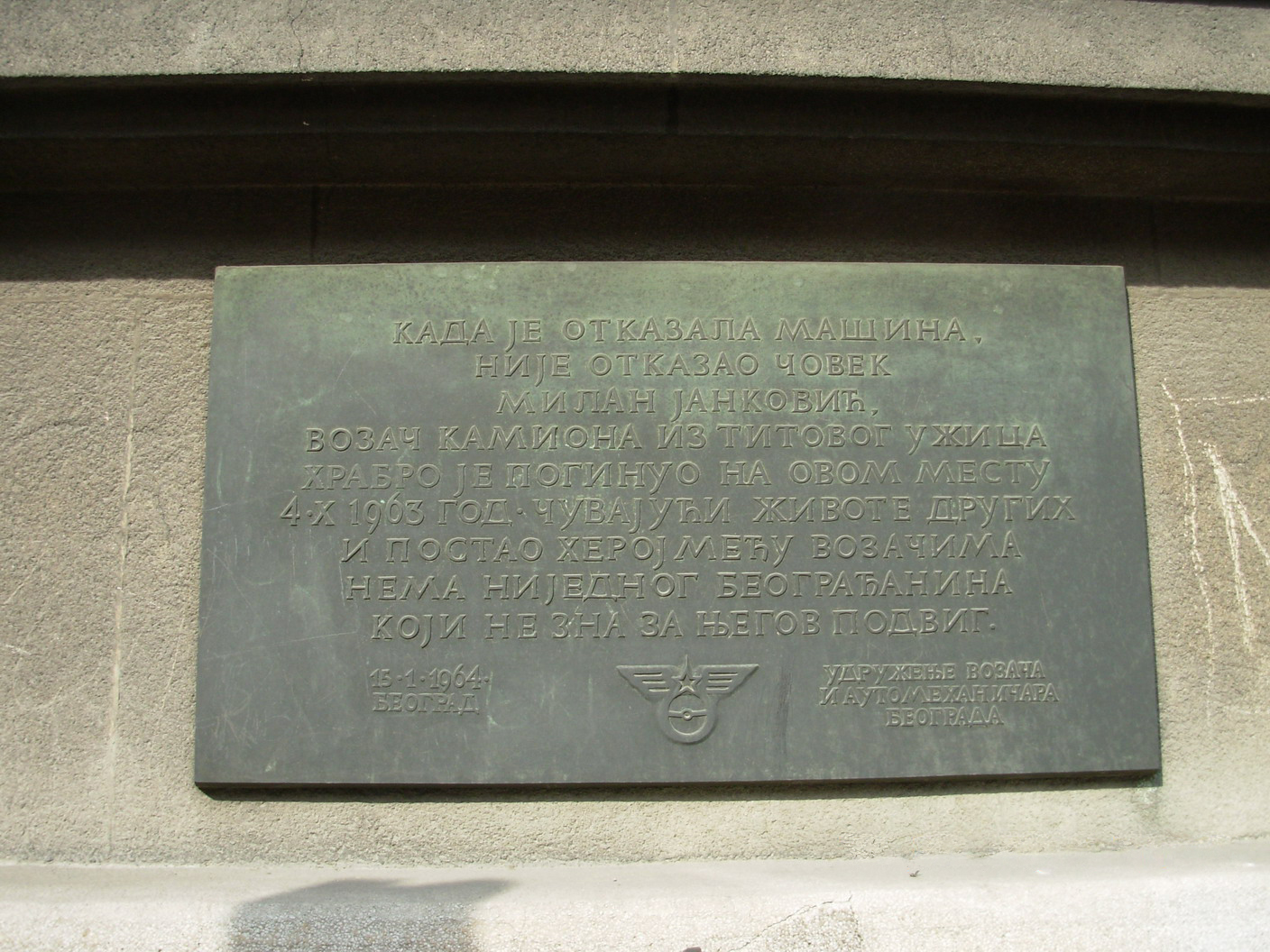 Spomenik vozaču - znamenitosti Beograda - fotografisao Goldfinger